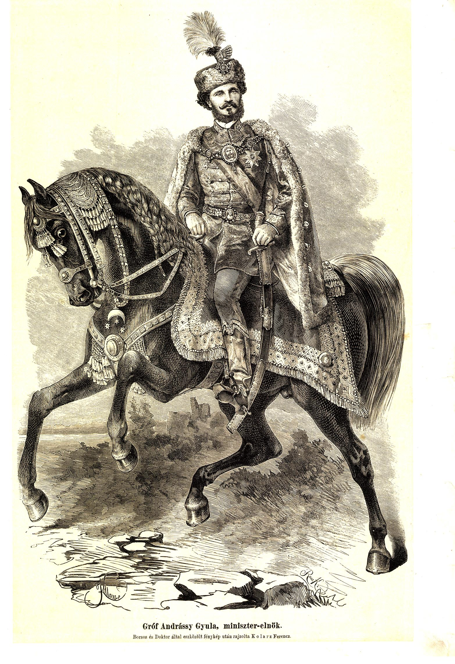 Idősebb csíkszentkirályi és krasznahorkai gróf Andrássy Gyula (Kassa, 1823. március 3. – Volosca (Fiume mellett), 1890. február 18.); magyar politikus, államférfi, 1867–71-ig a Magyar Királyság miniszterelnöke, 1871–79-ig az Osztrák–Magyar Monarchia külügyminisztere, ifj. Andrássy Gyula apja.